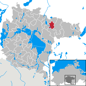 Groß Plasten in Mecklenburg-Western Pomerania - District Müritz